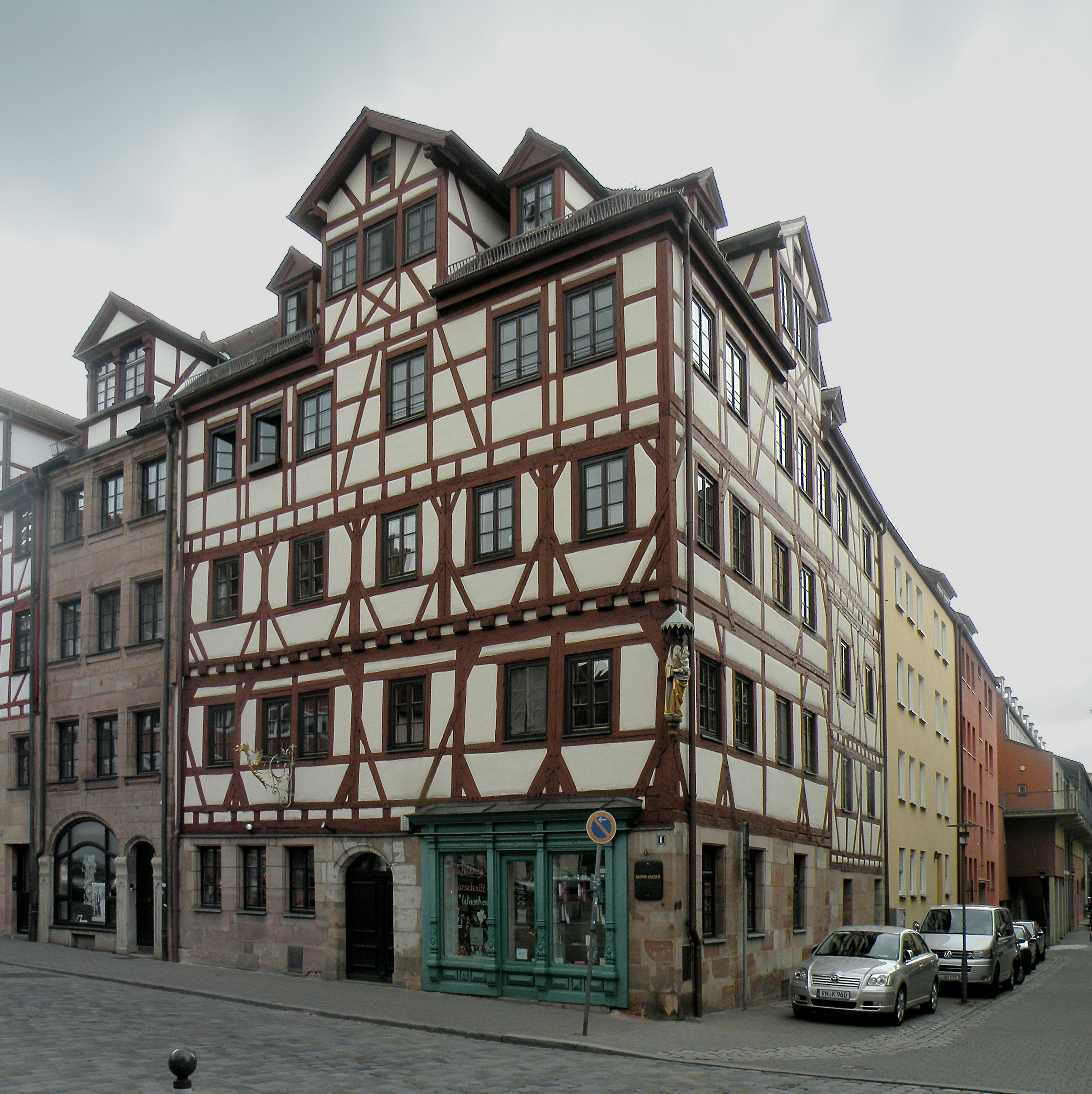 Kaspar Hauser house.